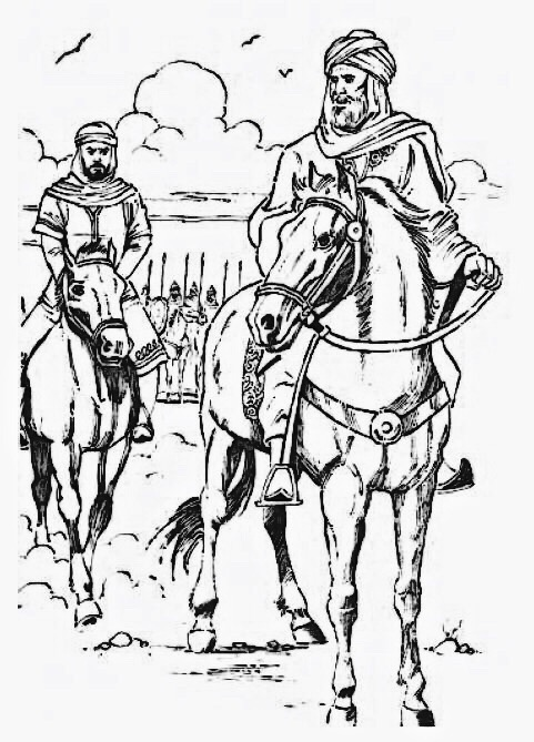 الصحابي البدري عتبة بن غزوان مع عرفجة بن هرثمة